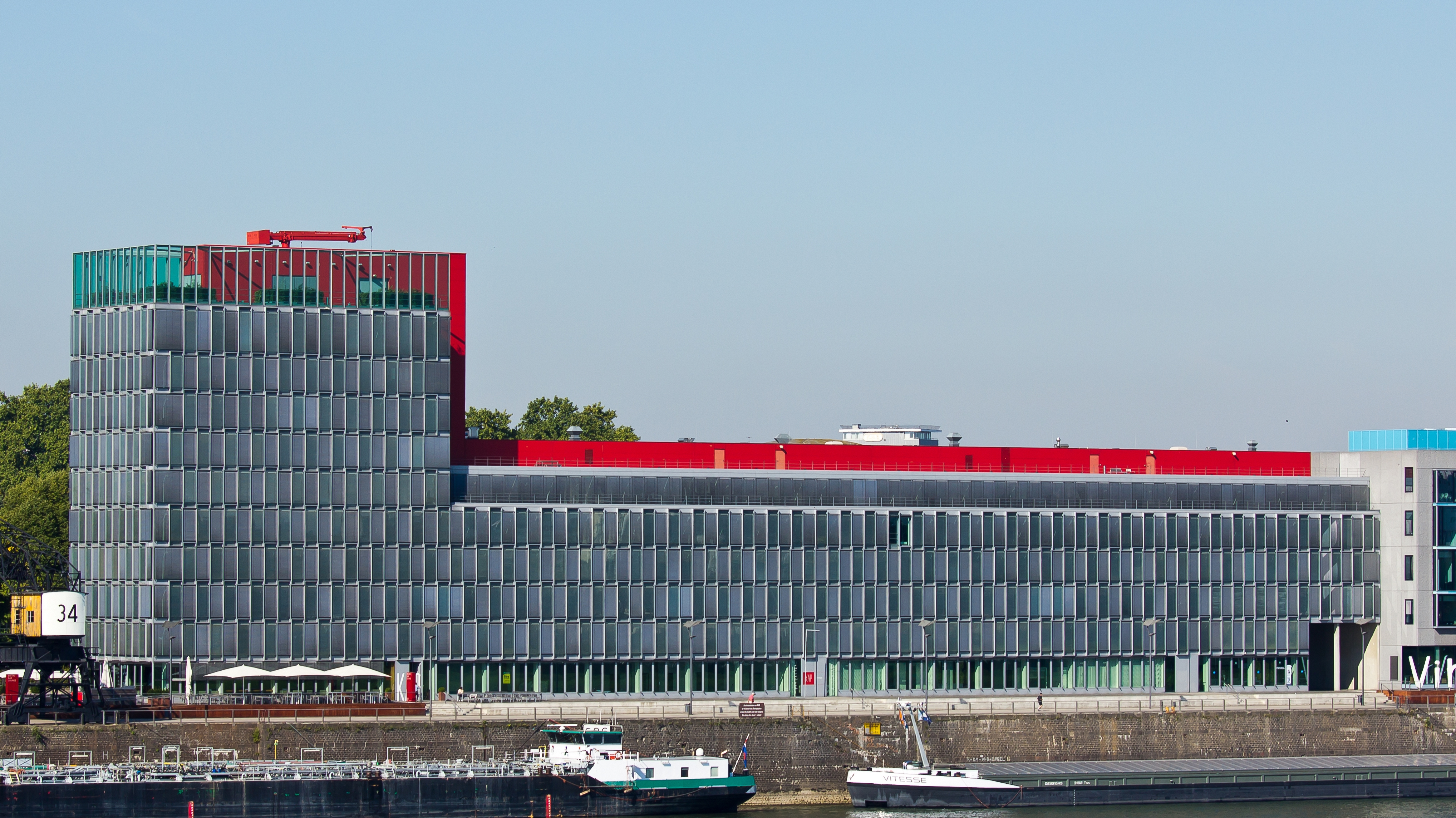 KAP am Südkai, Agrippinawerft, Rheinauhafen Köln